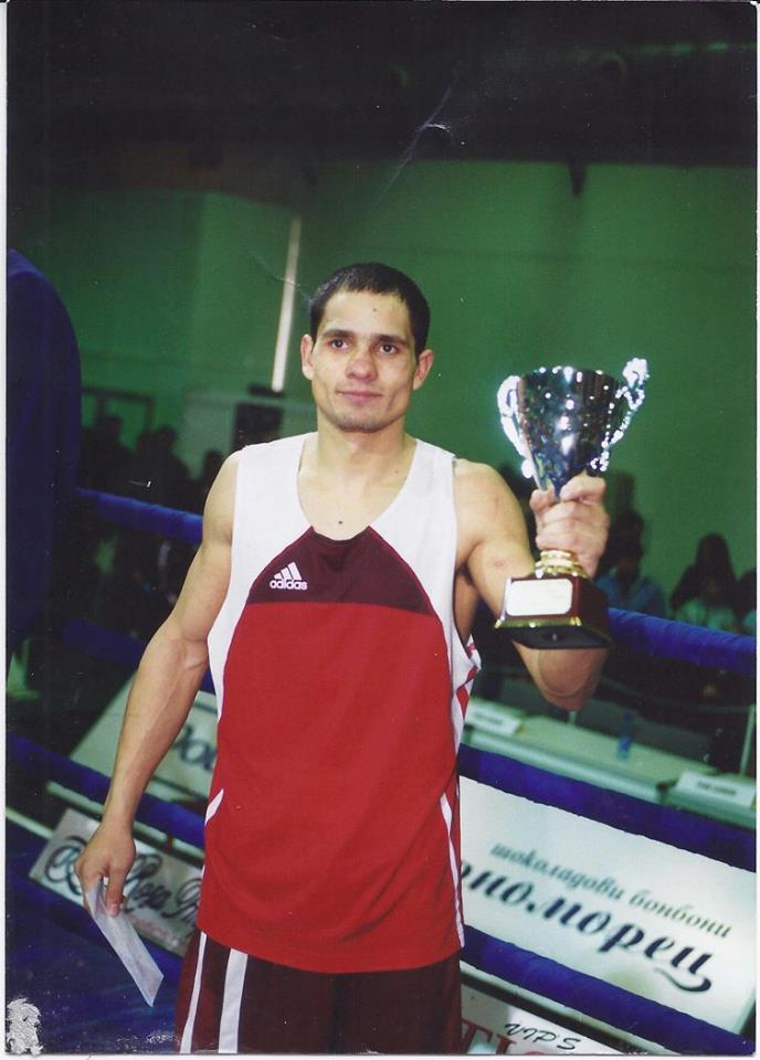 Носител на купата "Странджа)